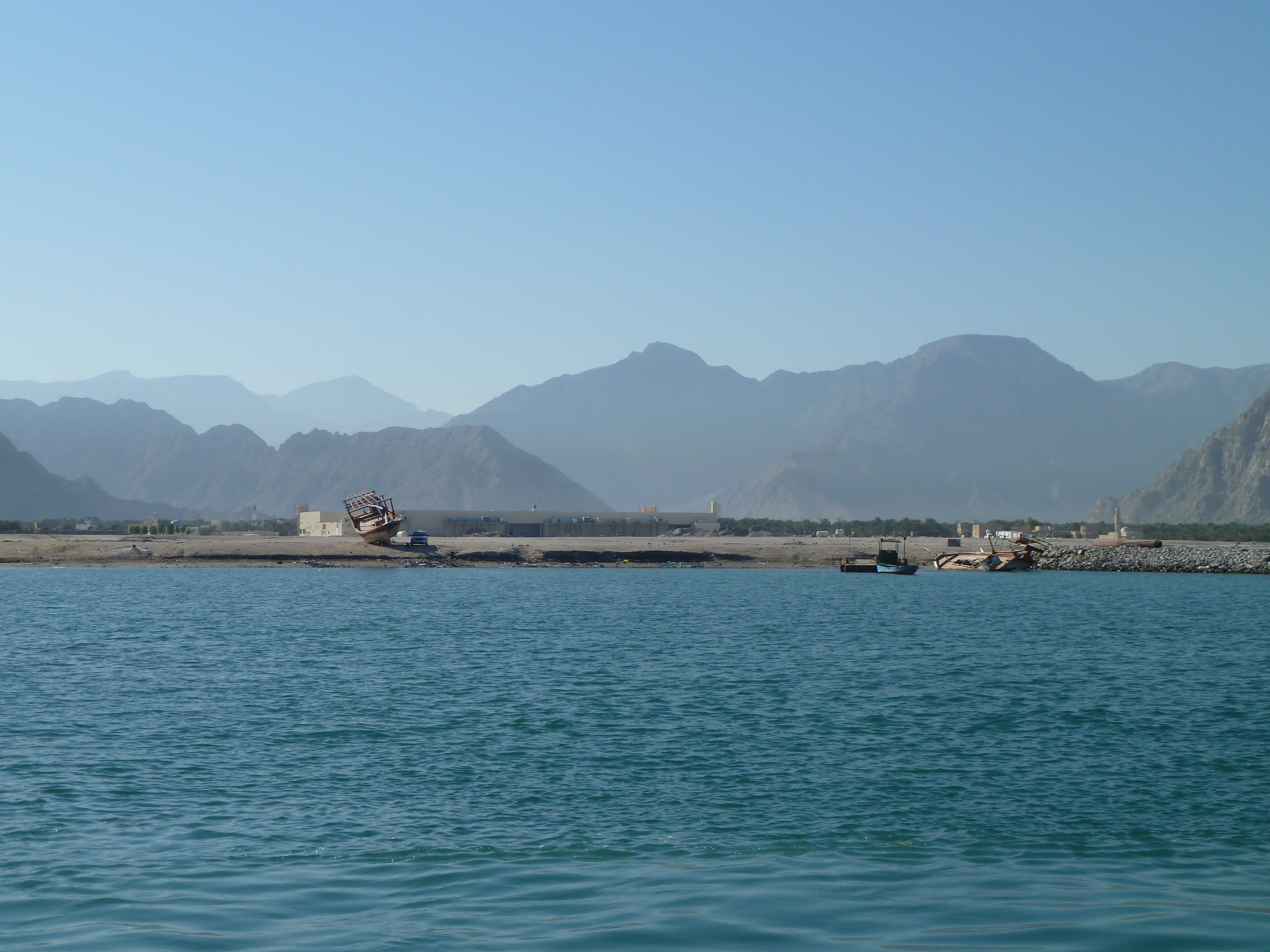 Dhow Cruise, Khasab, Oman